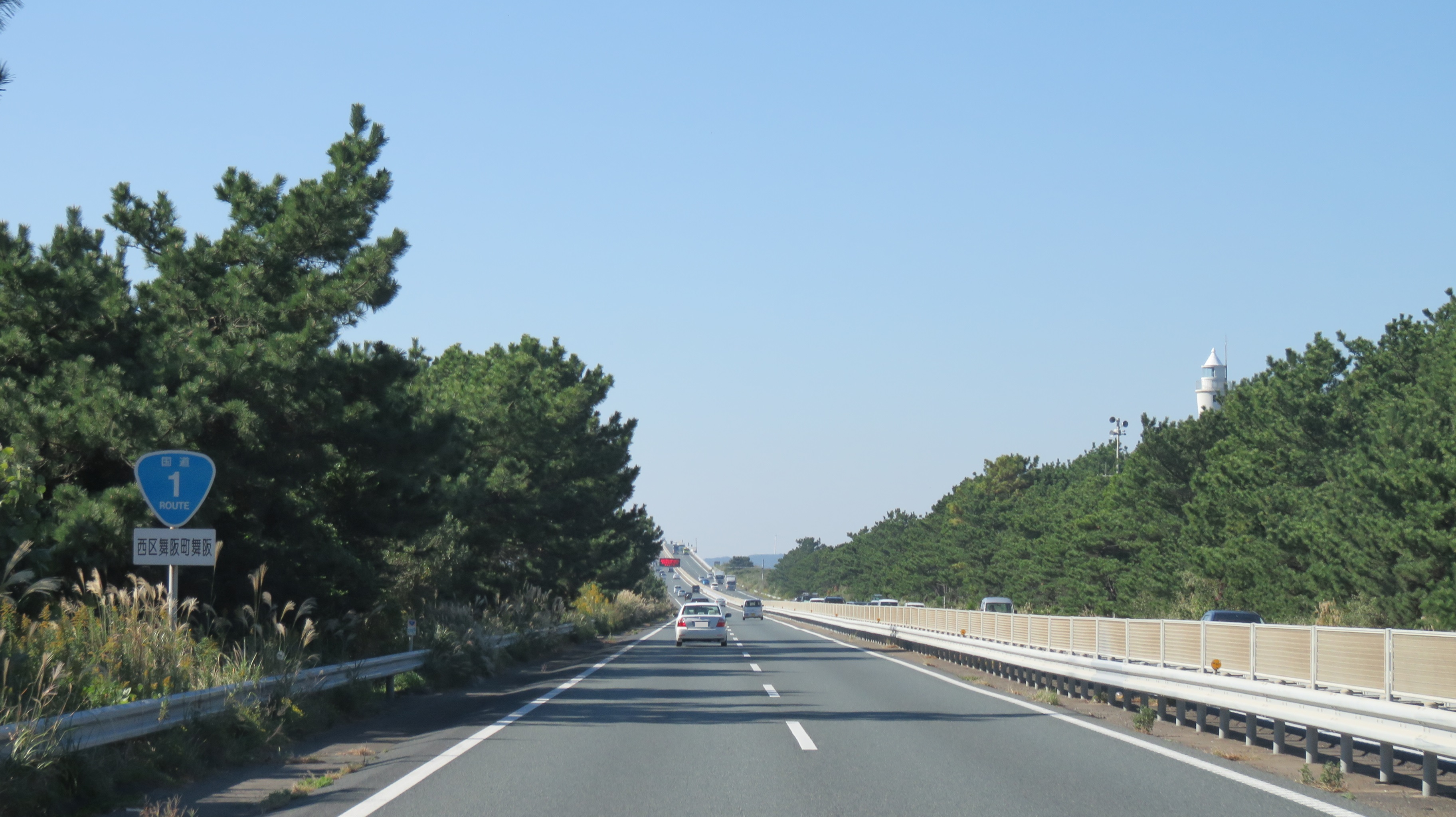 国道1号 浜名バイパス付近